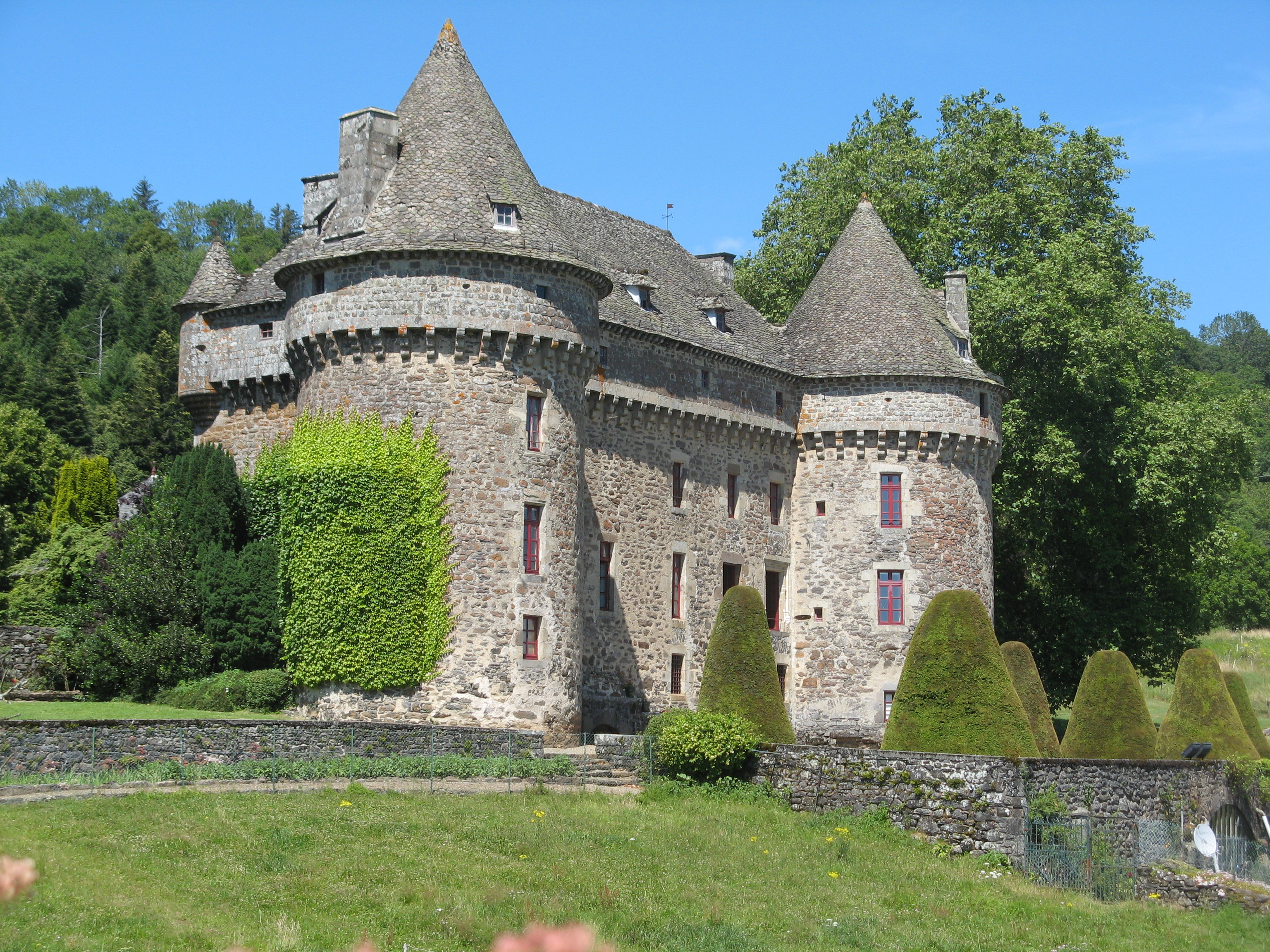 Auzers, façade sud du château .